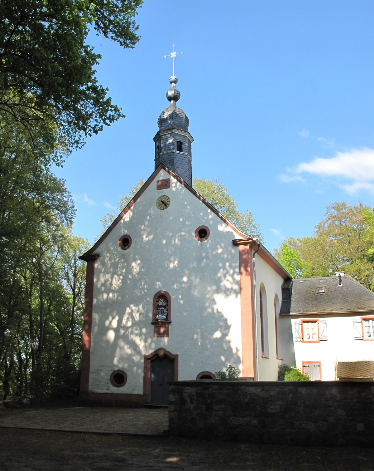 Schankweiler Klause